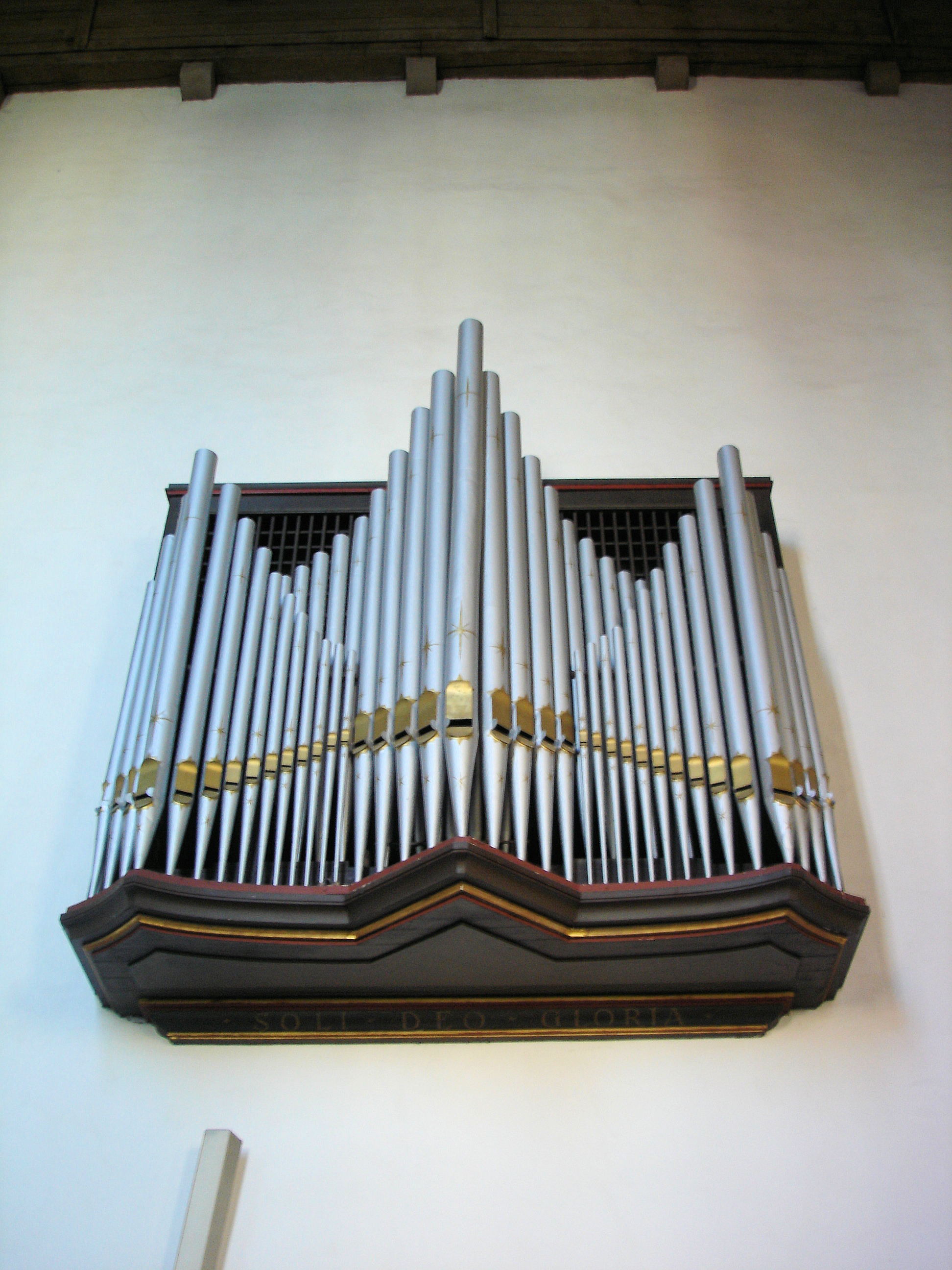 Orgel der Klosterkirche des Augustinerklosters in Erfurt